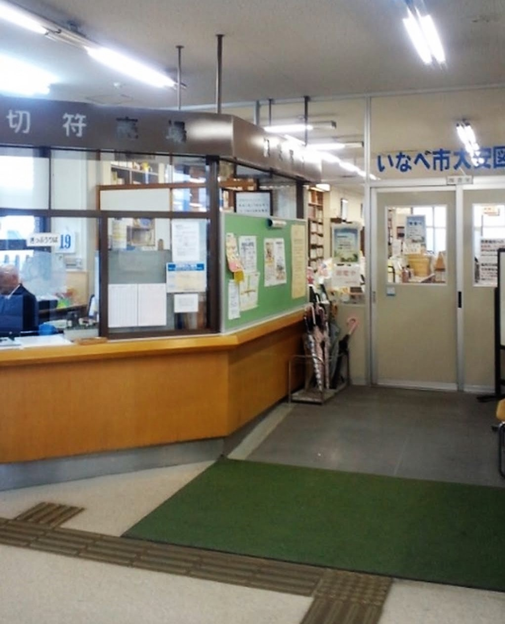 いなべ市大安図書館の入口（右）。